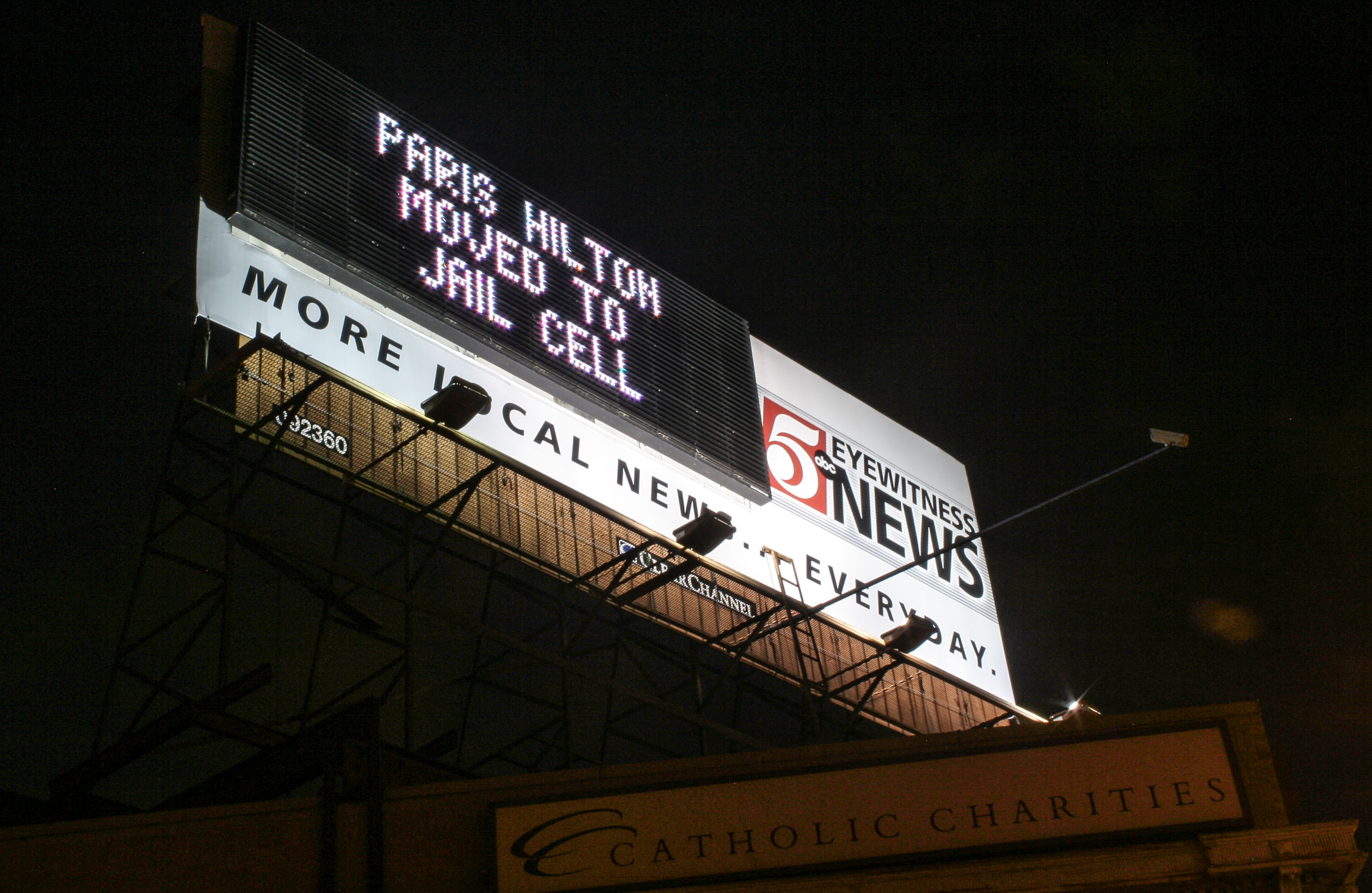 KSTP-TV Billboard